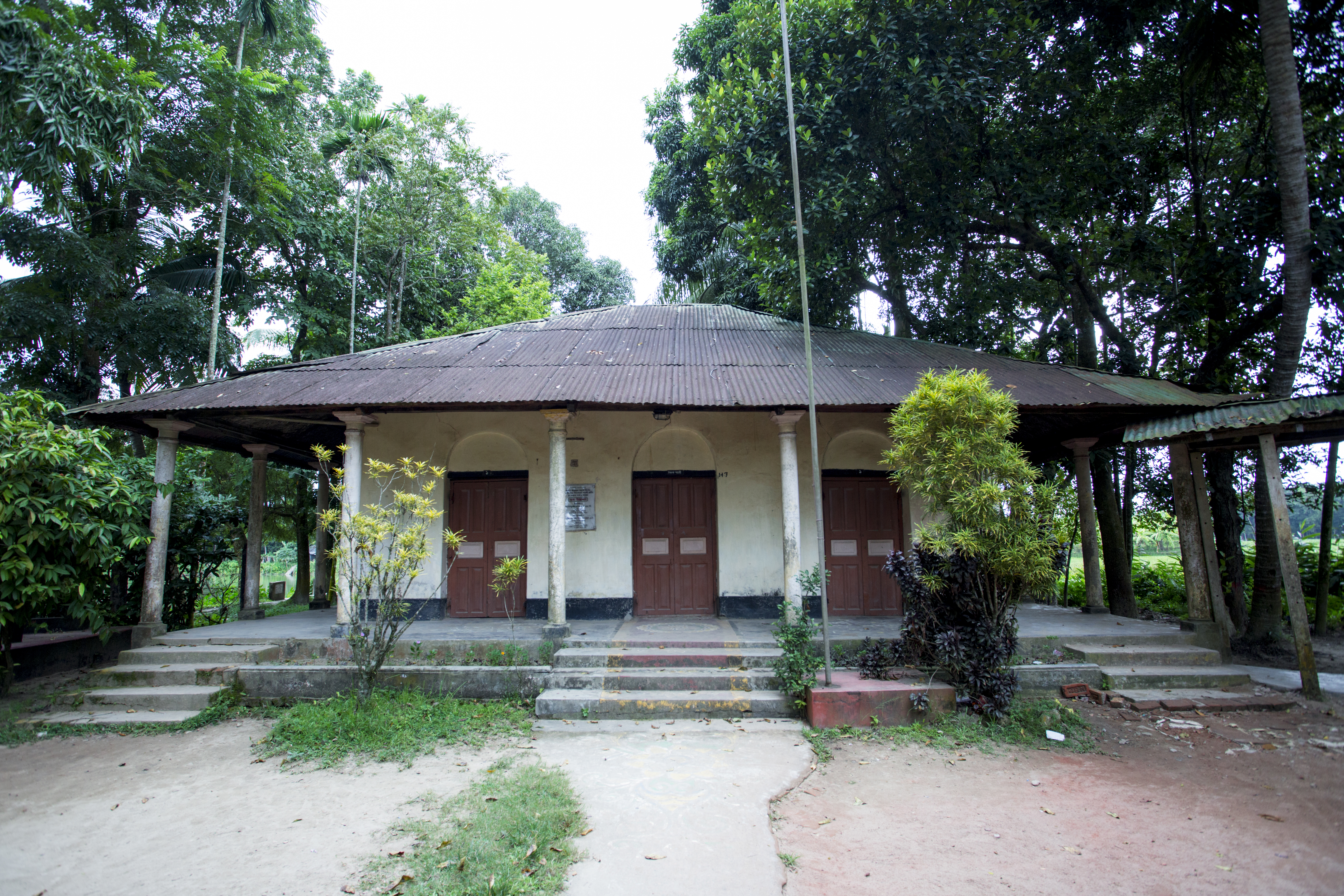 কধুরখীল উচ্চ বিদ্যালয়ের প্রাচীন মৃৎভবন ও পার্বতী চরণ দীঘী